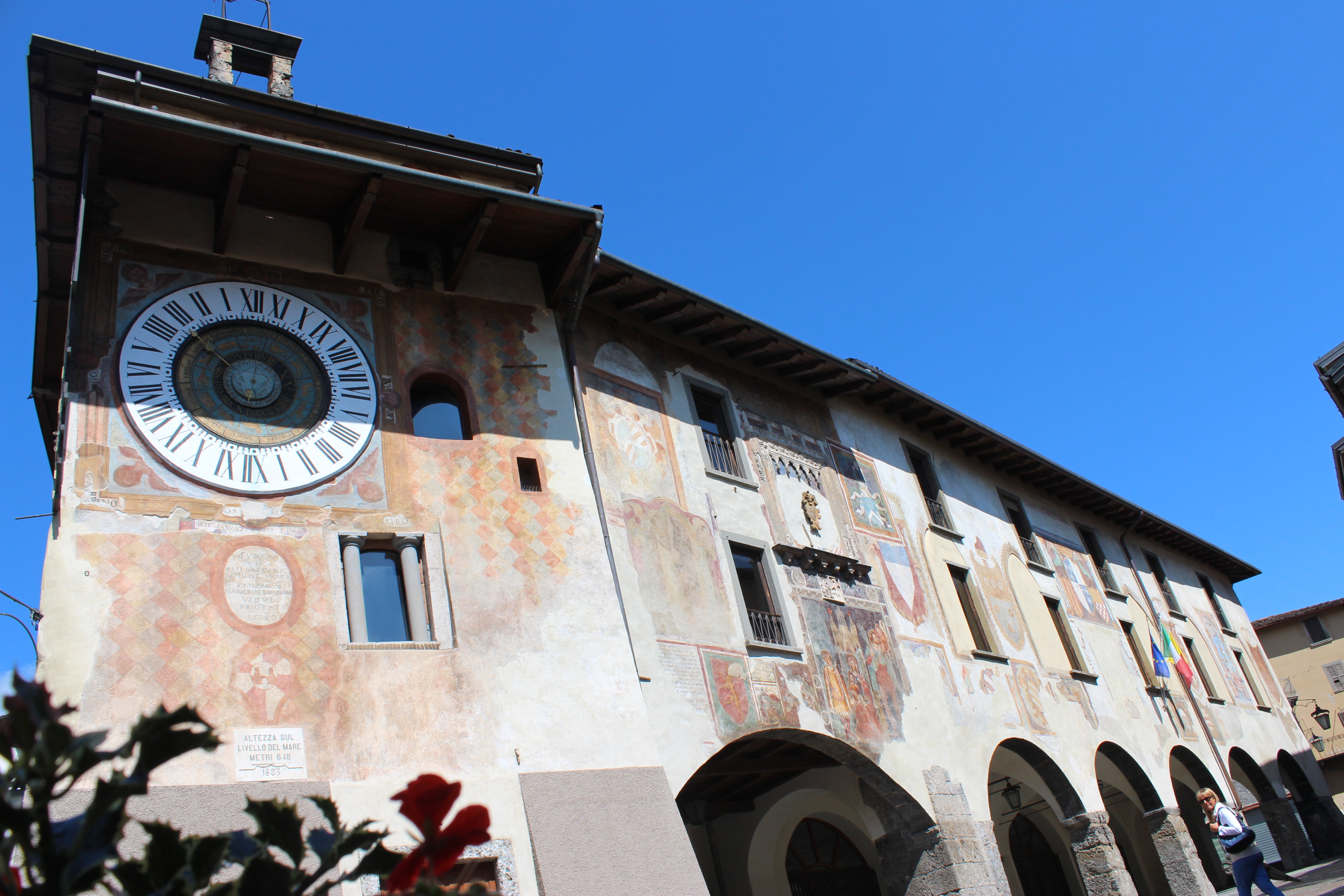 Torre dell'Orologio Planetario Fanzago This is a photo of a monument which is part of cultural heritage of Italy.